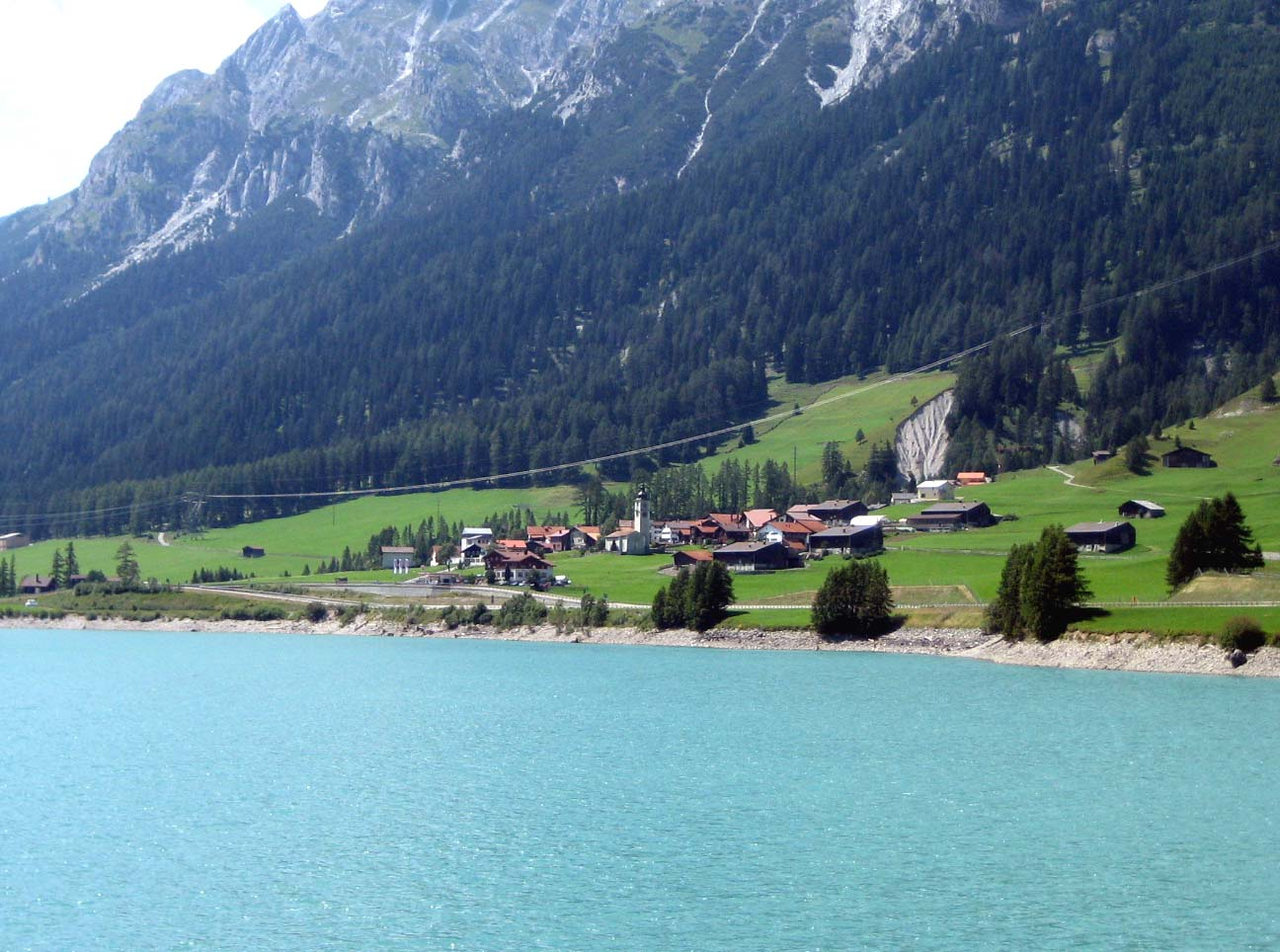 Sufers